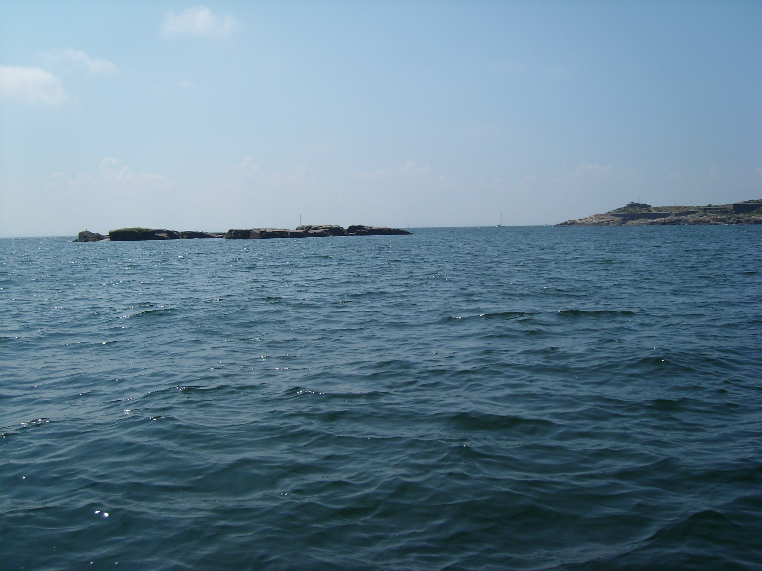 Østerskær, de østligste landområder i Danmark ved Christiansø, Bornholm i Østersøen